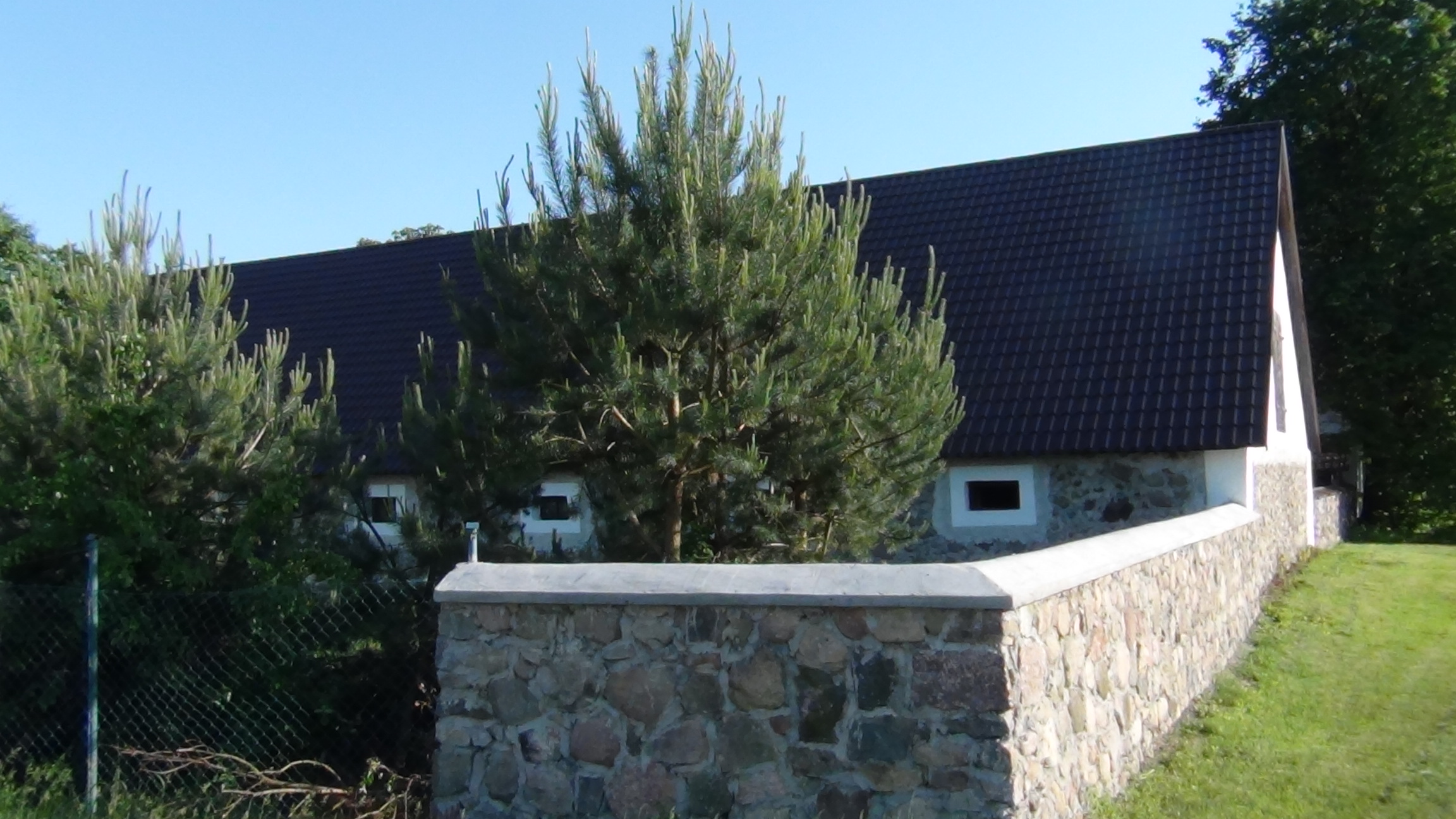 Przęczki - zabudowania